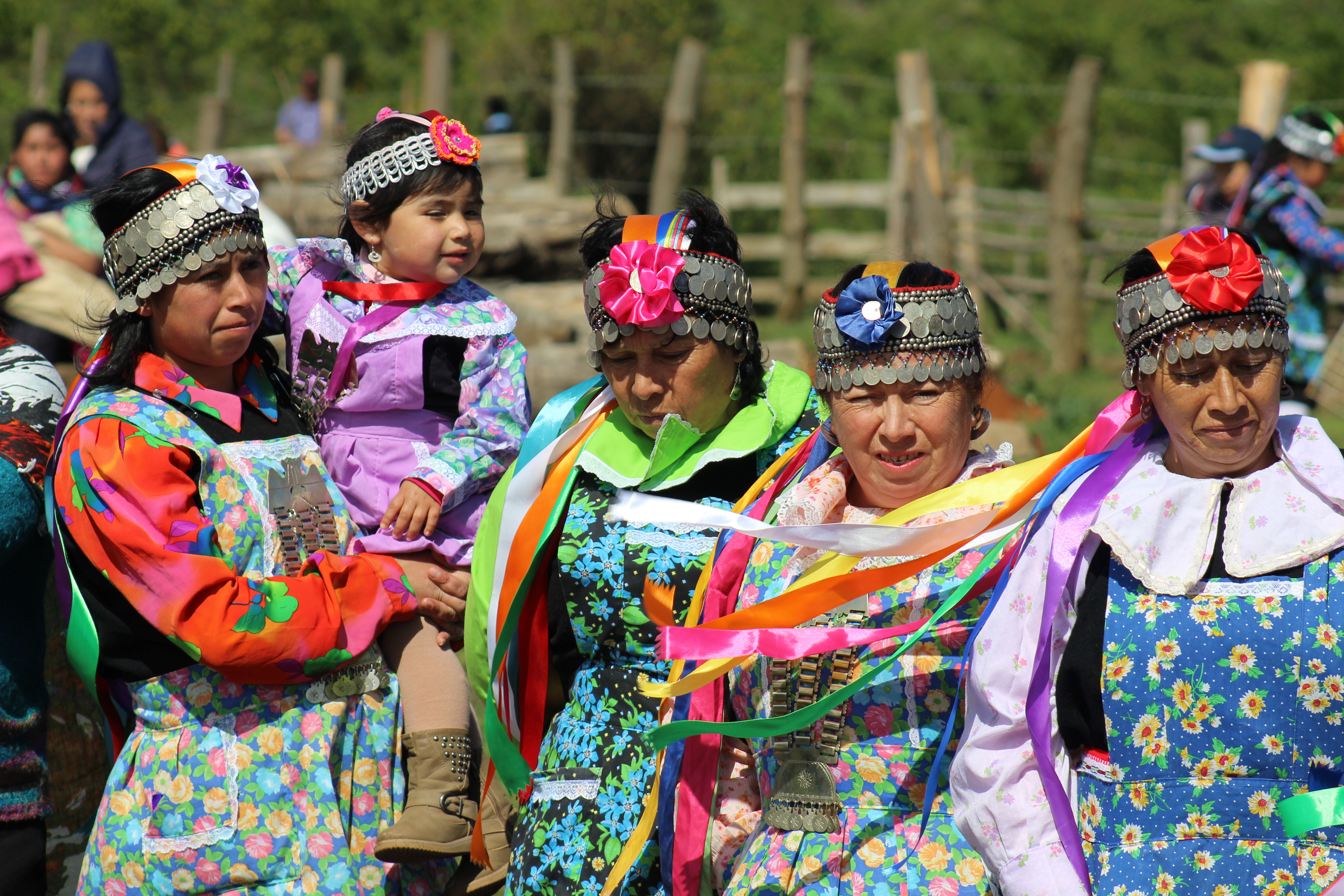 Ministro Osorio entrega terreno a Comunidad Mapuche Lorenzo Quintrileo de Tirúa